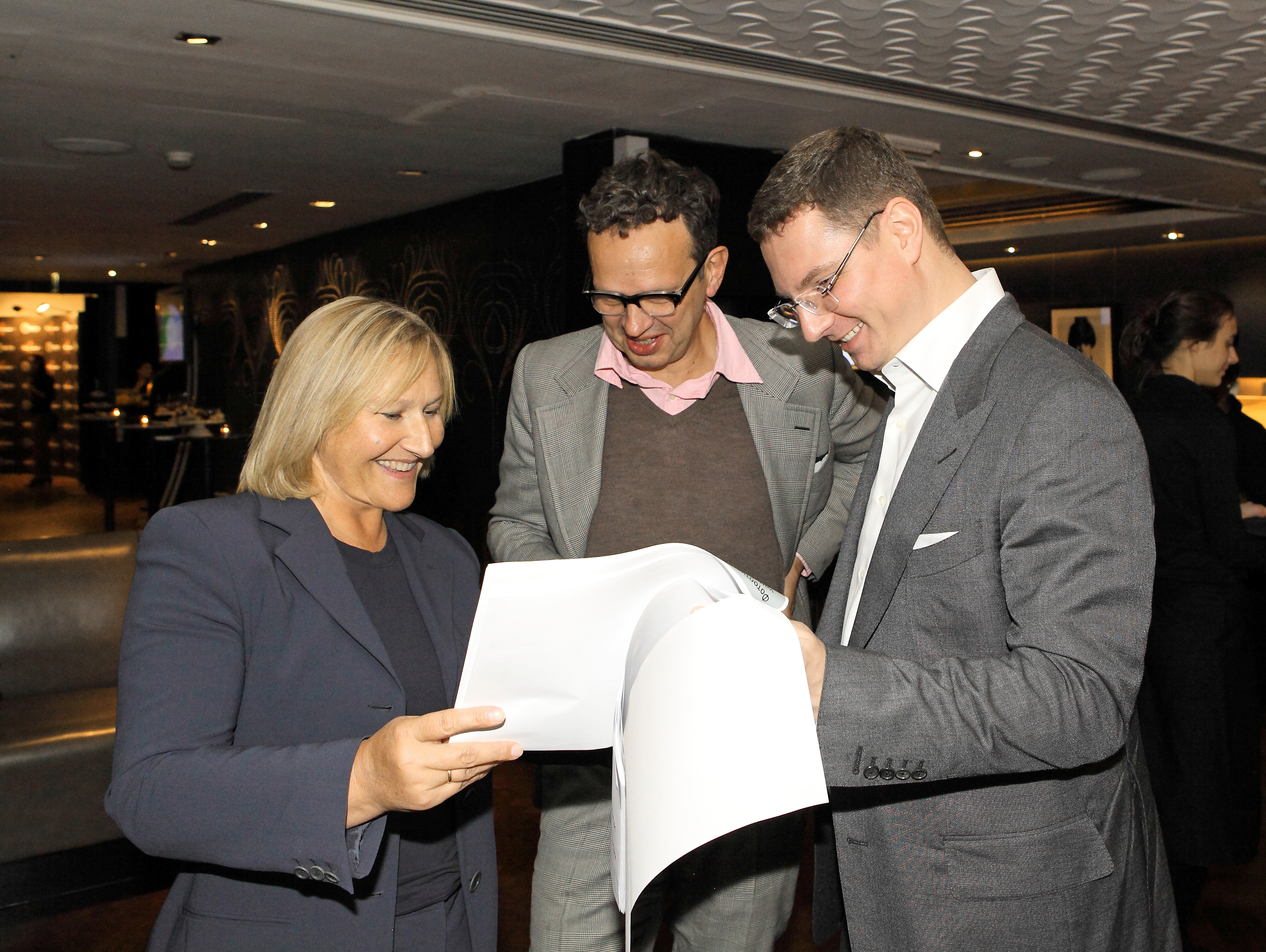 Yelena-Baturina-and-designer-Tom-Dixon